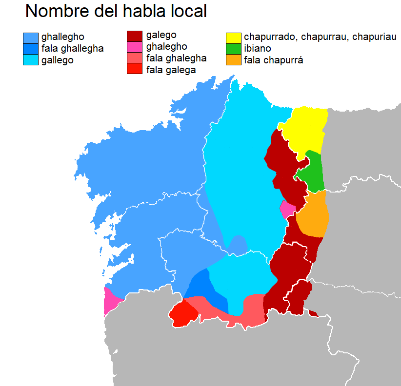 Denominación da lingua local no dominio lingüístico galego, segundo os datos do ALPI